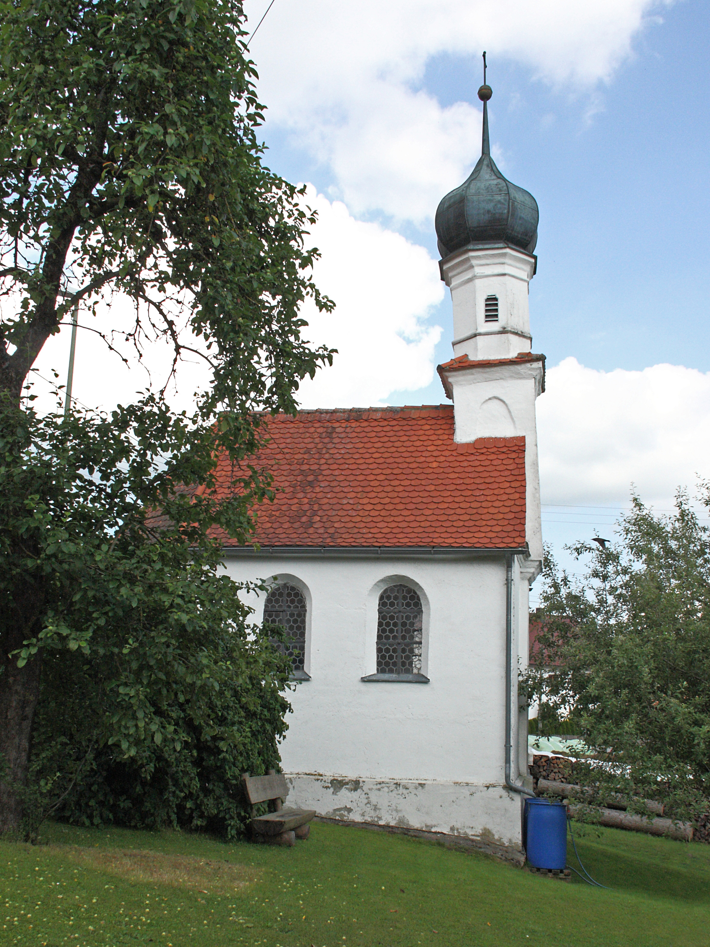 Ansicht von Norden